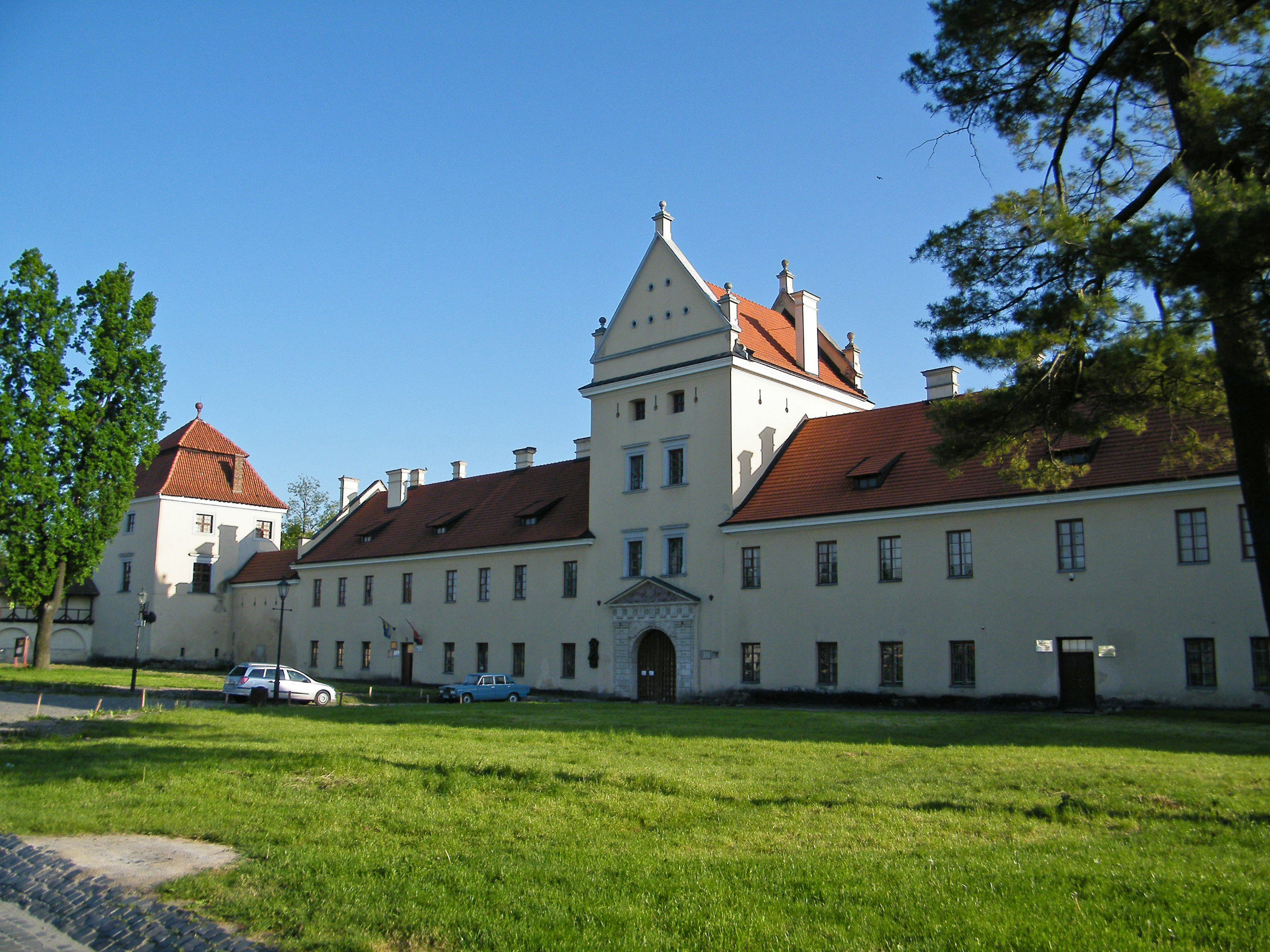 Фасад Жолковского замка